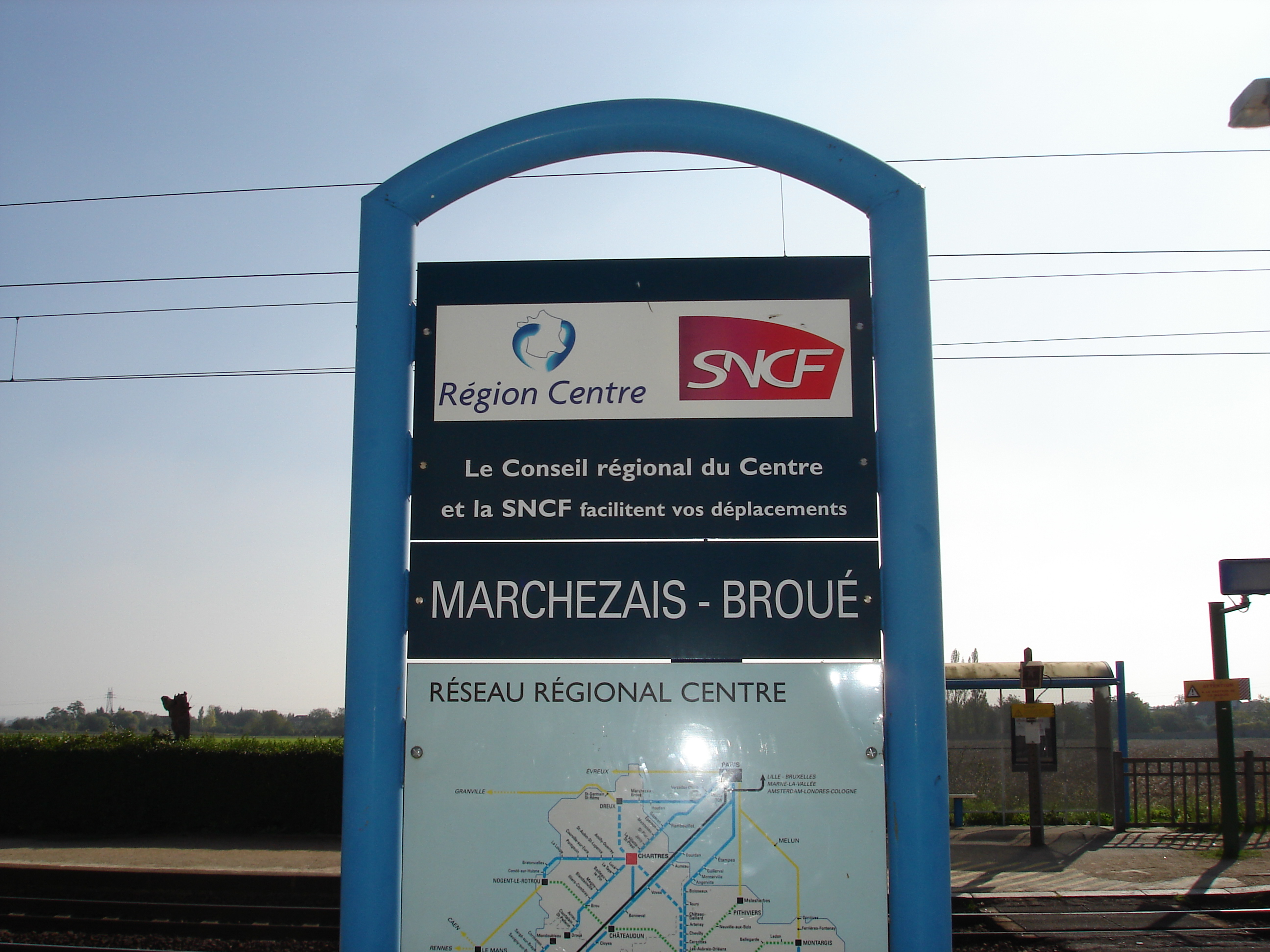 Gare de Marchezais - Broué (28) : Le panneau à l'entrée de la gare.